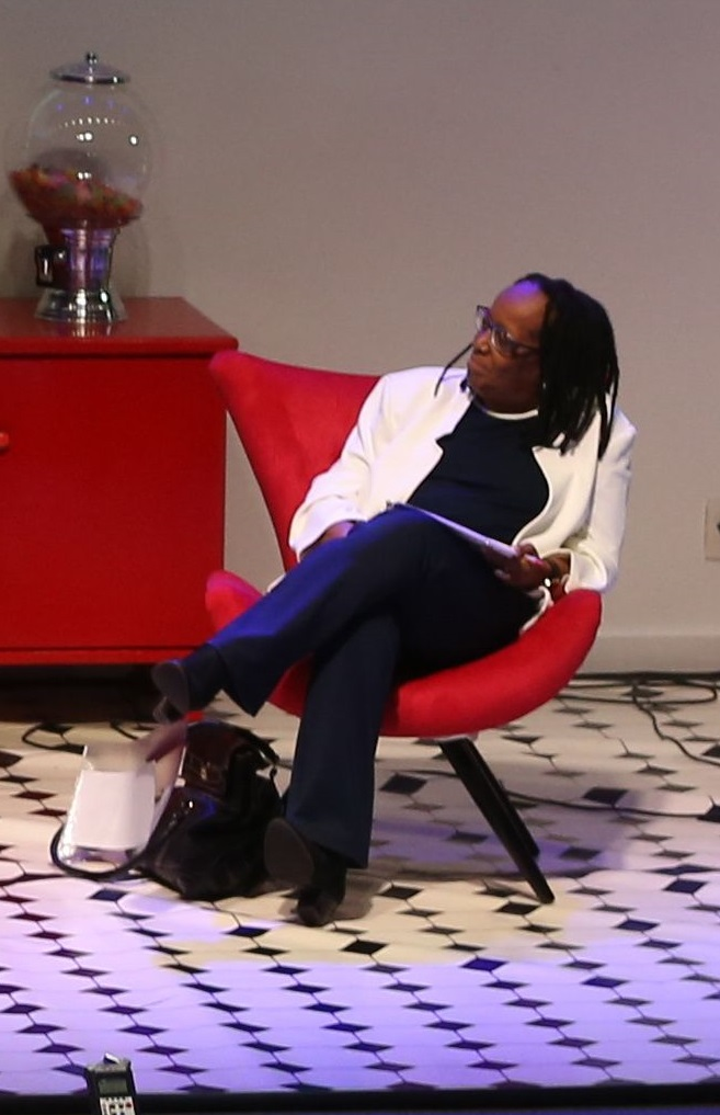 Brasília - A filósofa Sueli Carneiro no quarto dia do Festival Latinidades 2016 (Elza Fiuza/Agência Brasil)